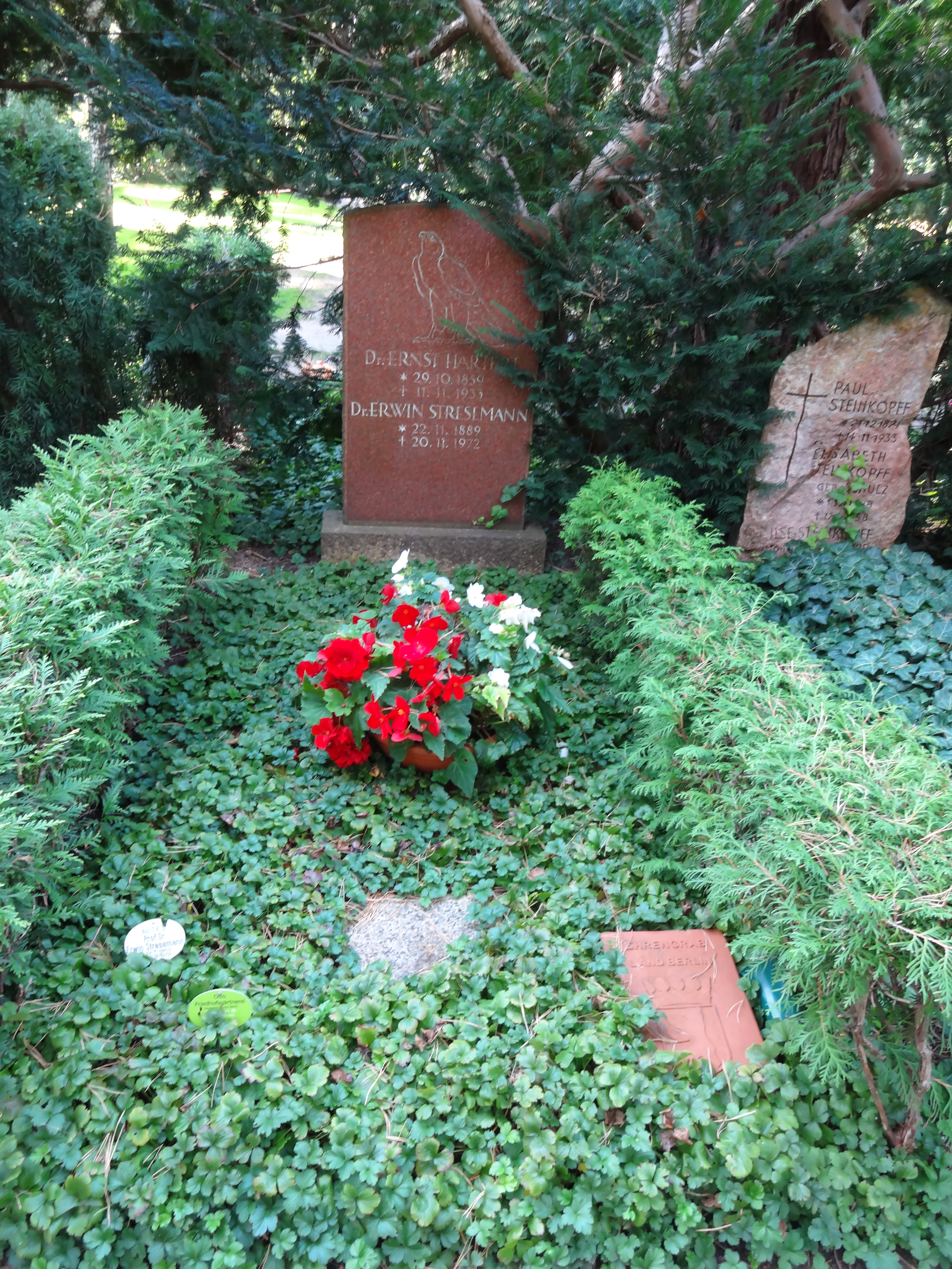 Ehrengrab von Stresemann, Erwin auf dem Waldfriedhof Dahlem, der Friedhof ist als Gartendenkmal der Stadt Berlin (Nr. 09045949)This is a photograph of an architectural monument.